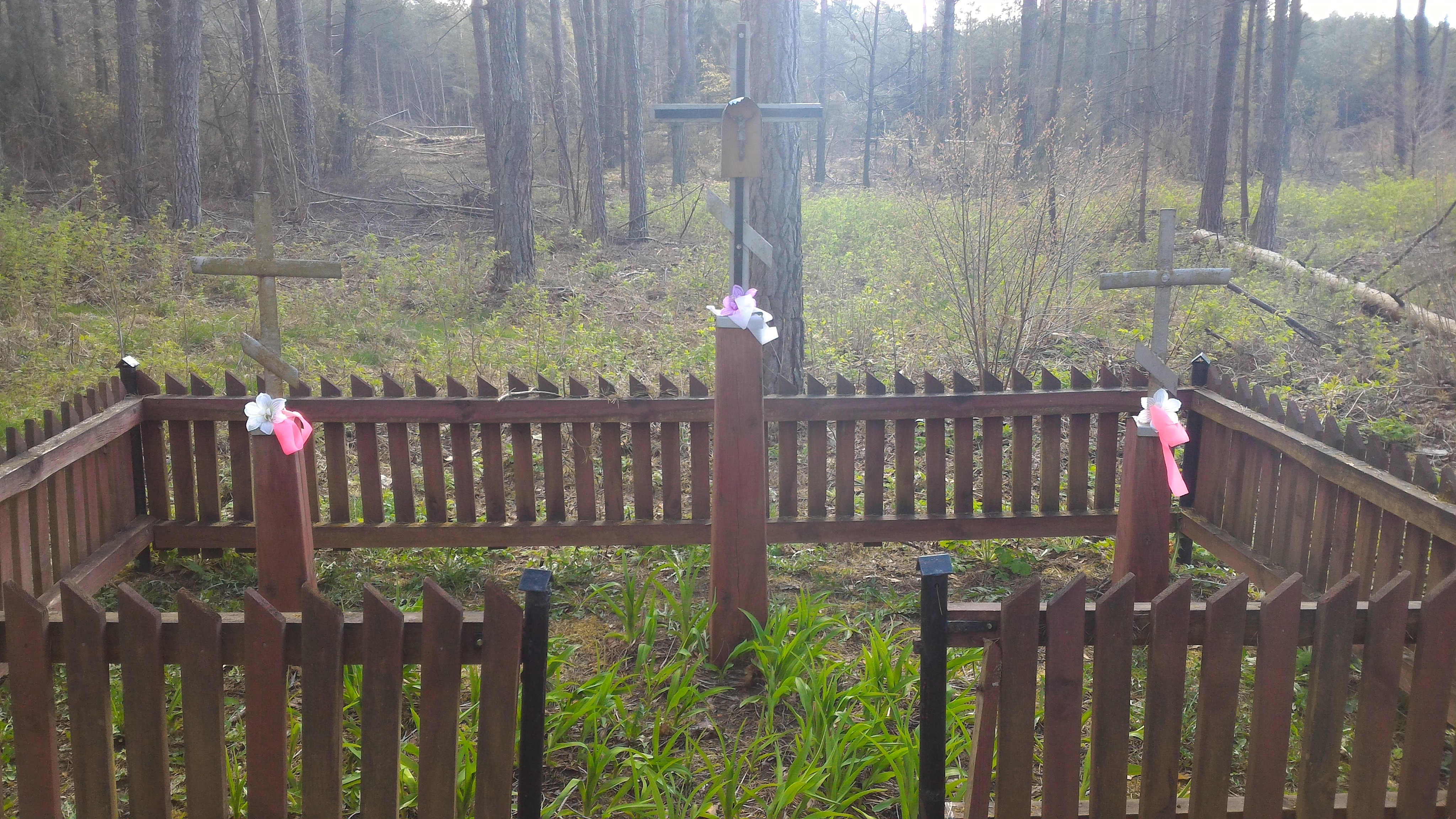 Krzyże epidemiczne w lesie nieopodal wsi Dawidowicze (Strylcie)